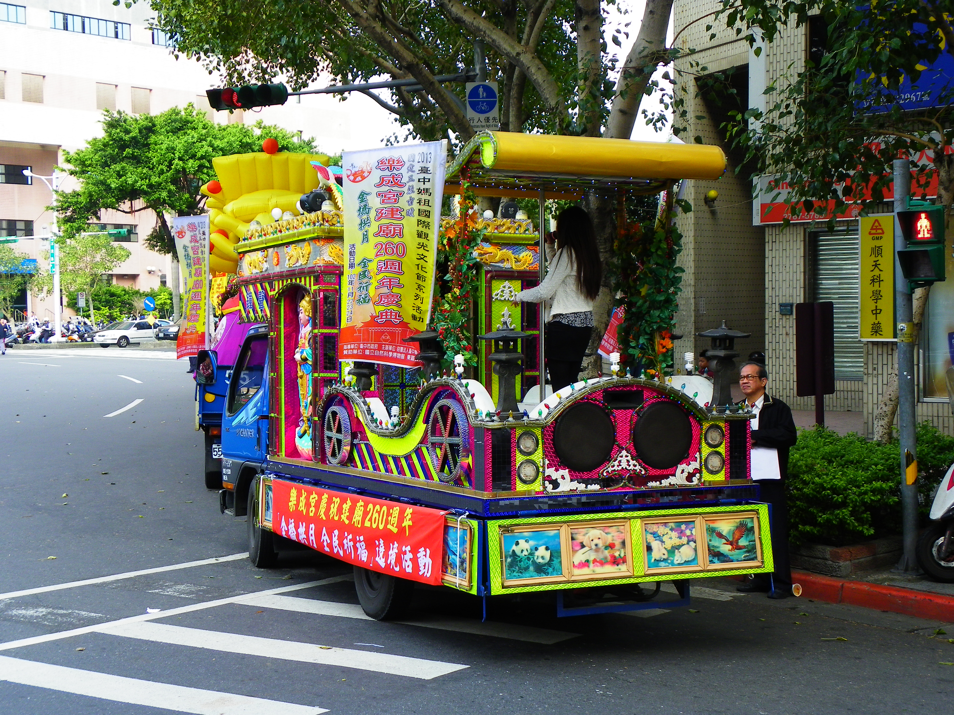 中文（台灣）: 松山慈祐宮建宮260週年紀念媽祖遶境，交通管制暫停中的台中樂成宮歌女花車左後方。